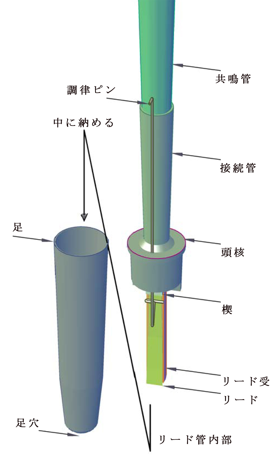 リード管構造図(Trompete)、部位名称、自作画像 from jawp